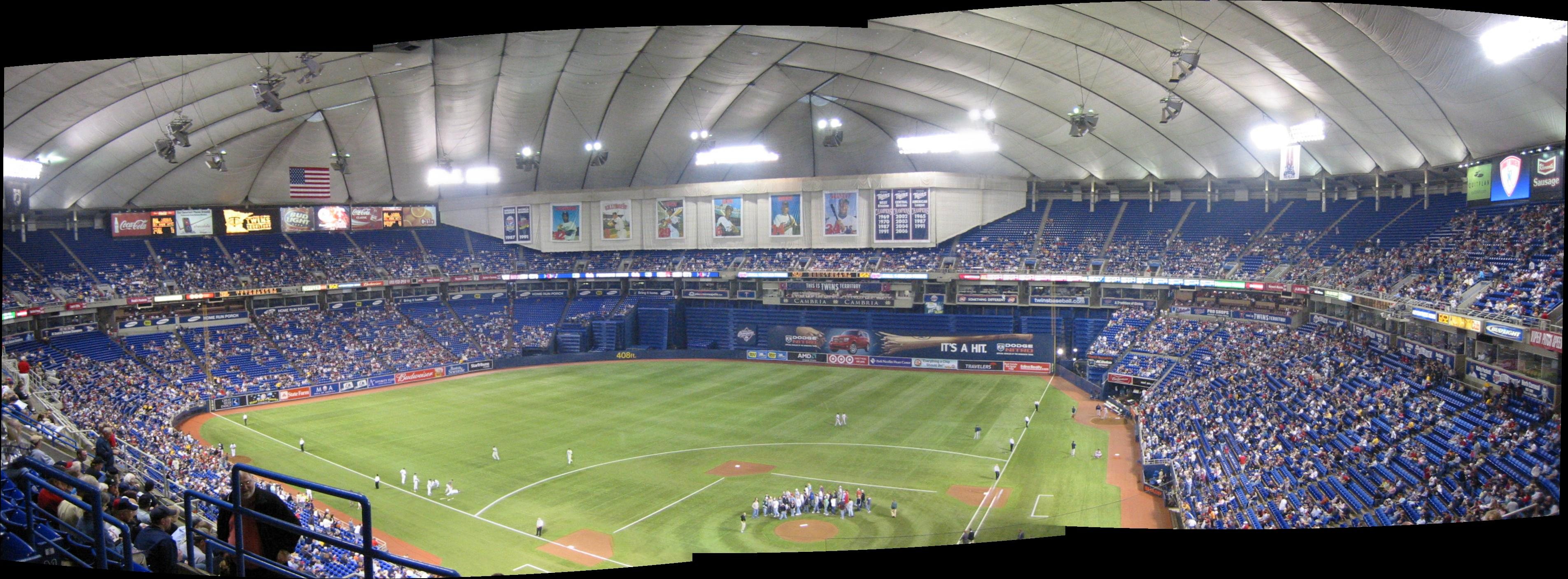 Panorama du Hubert H. Humphrey Metrodome de Minneapolis, MN